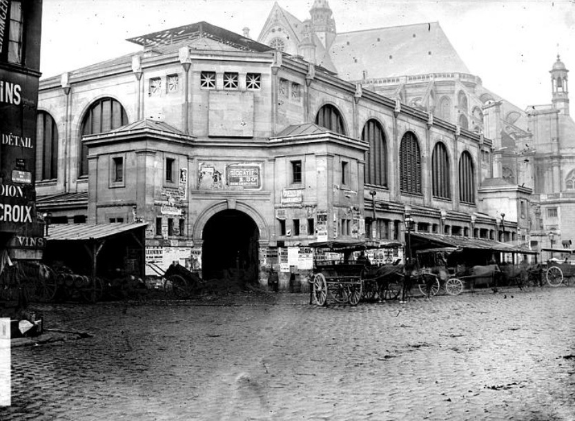 Premier pavillon des Halles centrales, détruit en 1859.